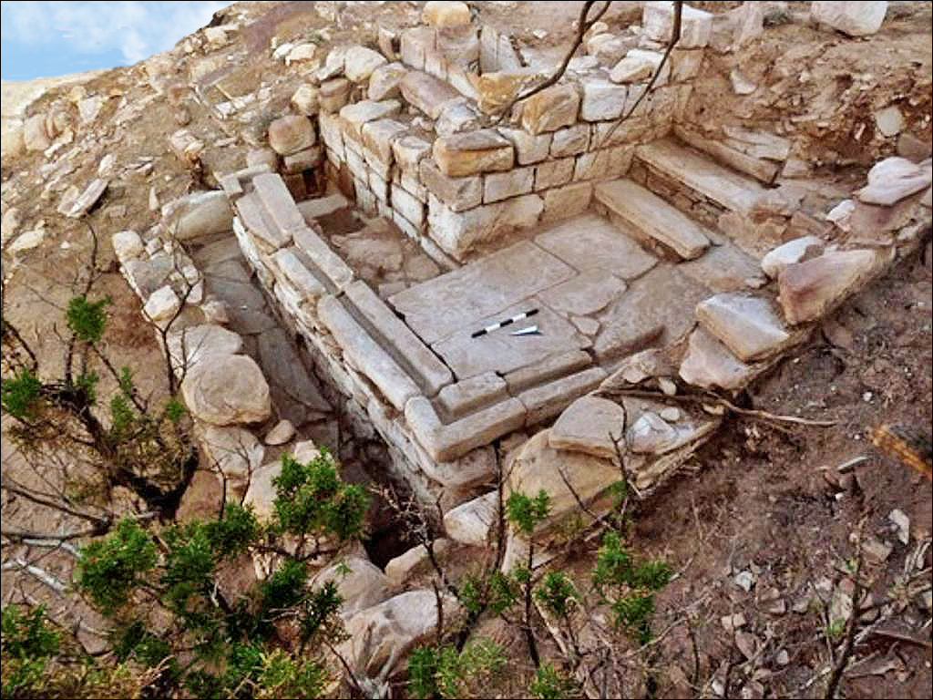 Thermes de Biyarah.Vestiges de l’emplacement des latrines, avec les sanitaires, à coté.